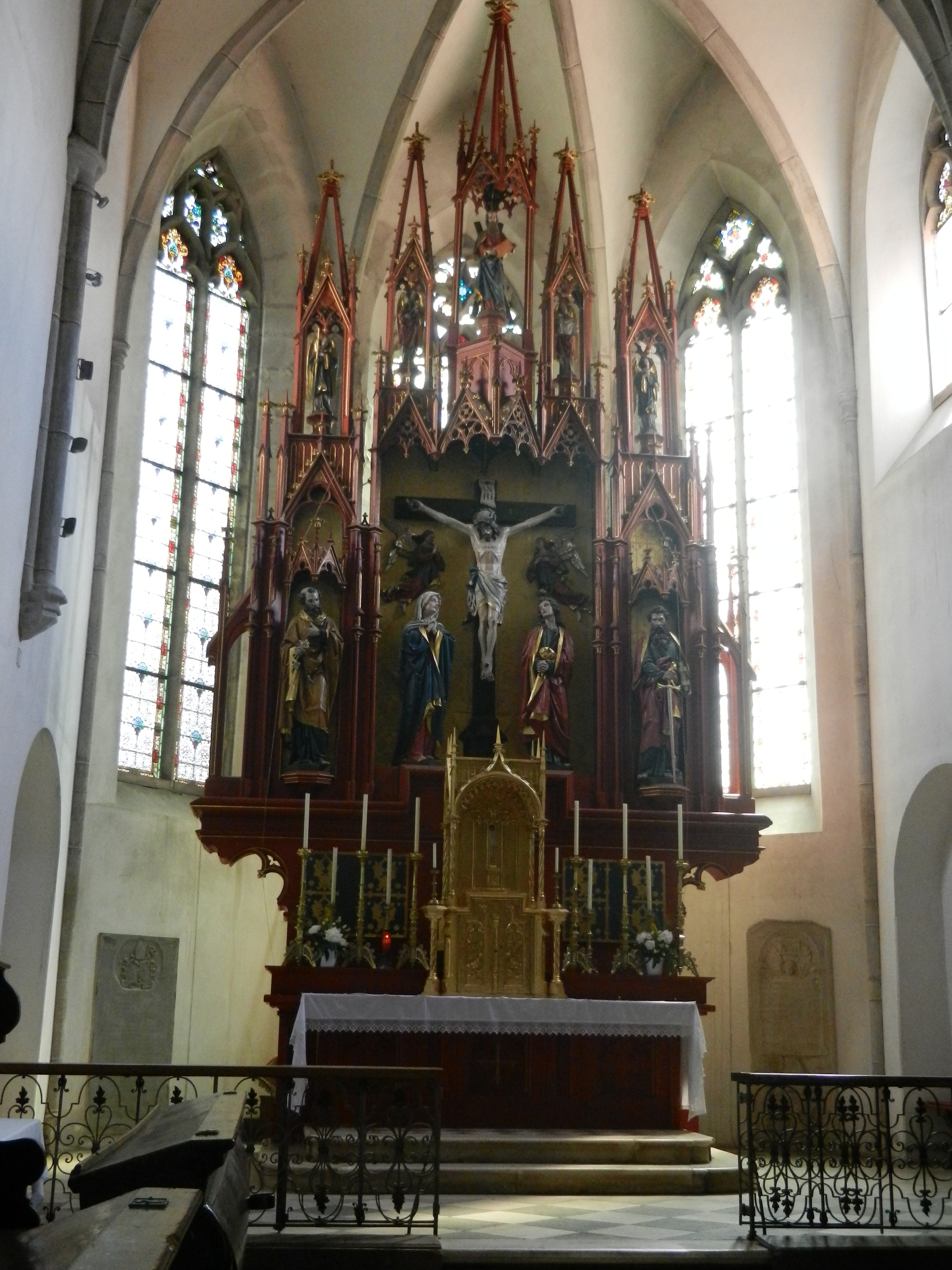 Župnijska cerkev sv. Andreja v Šentandražu v Labotski dolini, glavni oltar.